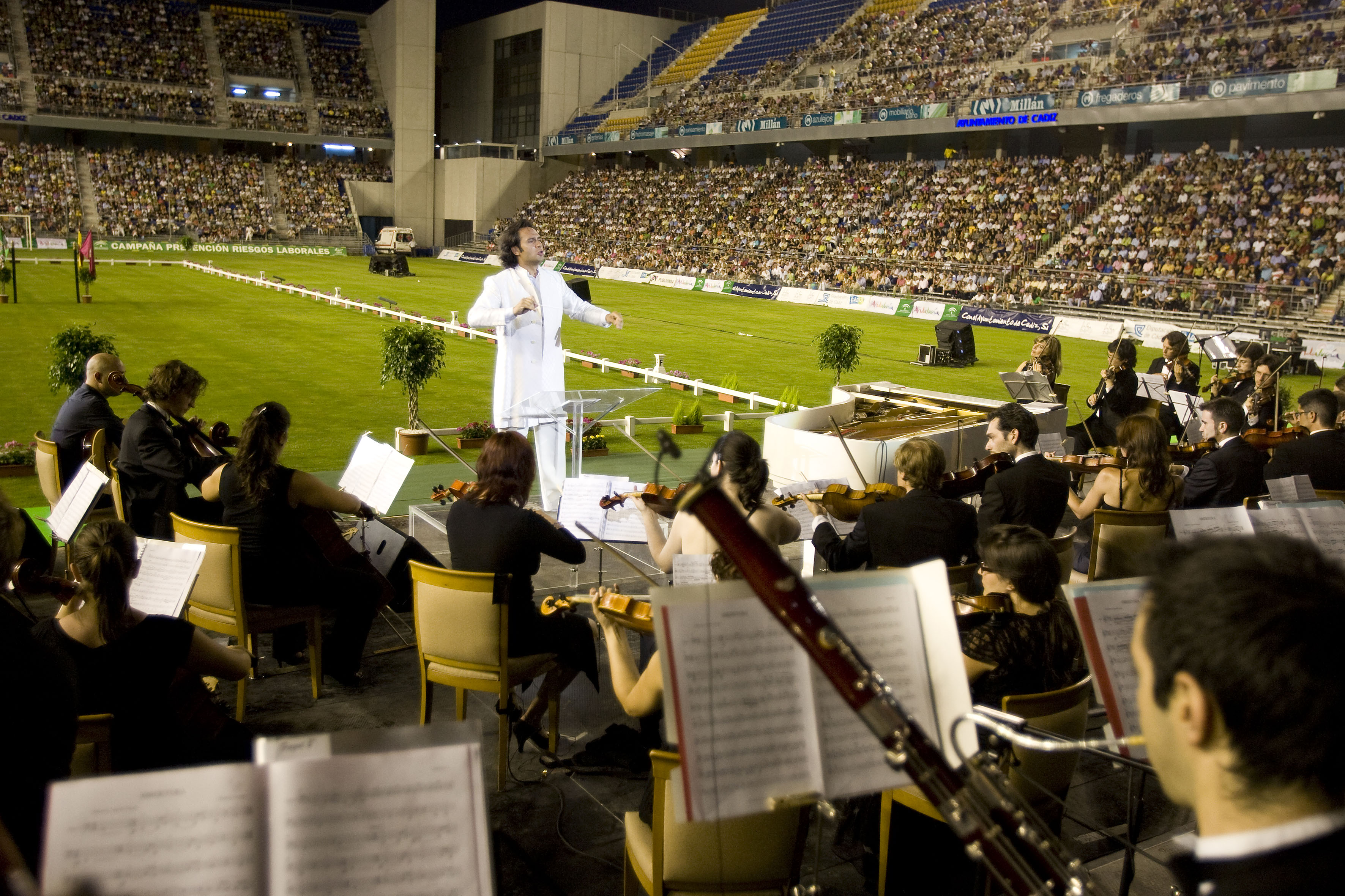 Manolo Carrasco dirigiendo en el estadio Ramon de Carranza de Cadiz en su propio espectaculo Sinfonia Ecuestre